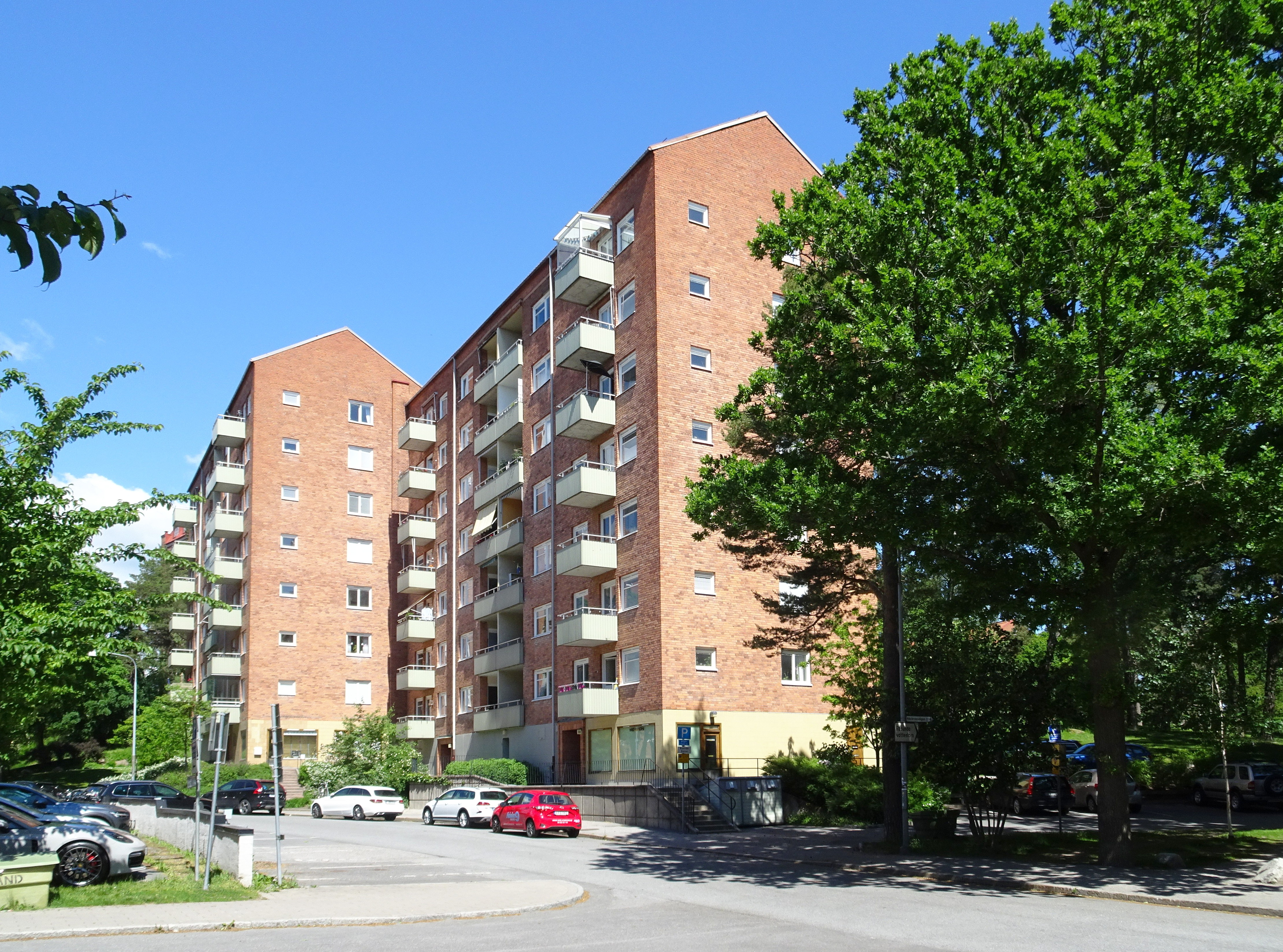 Bostadsområdet Näckrosen, Råsunda